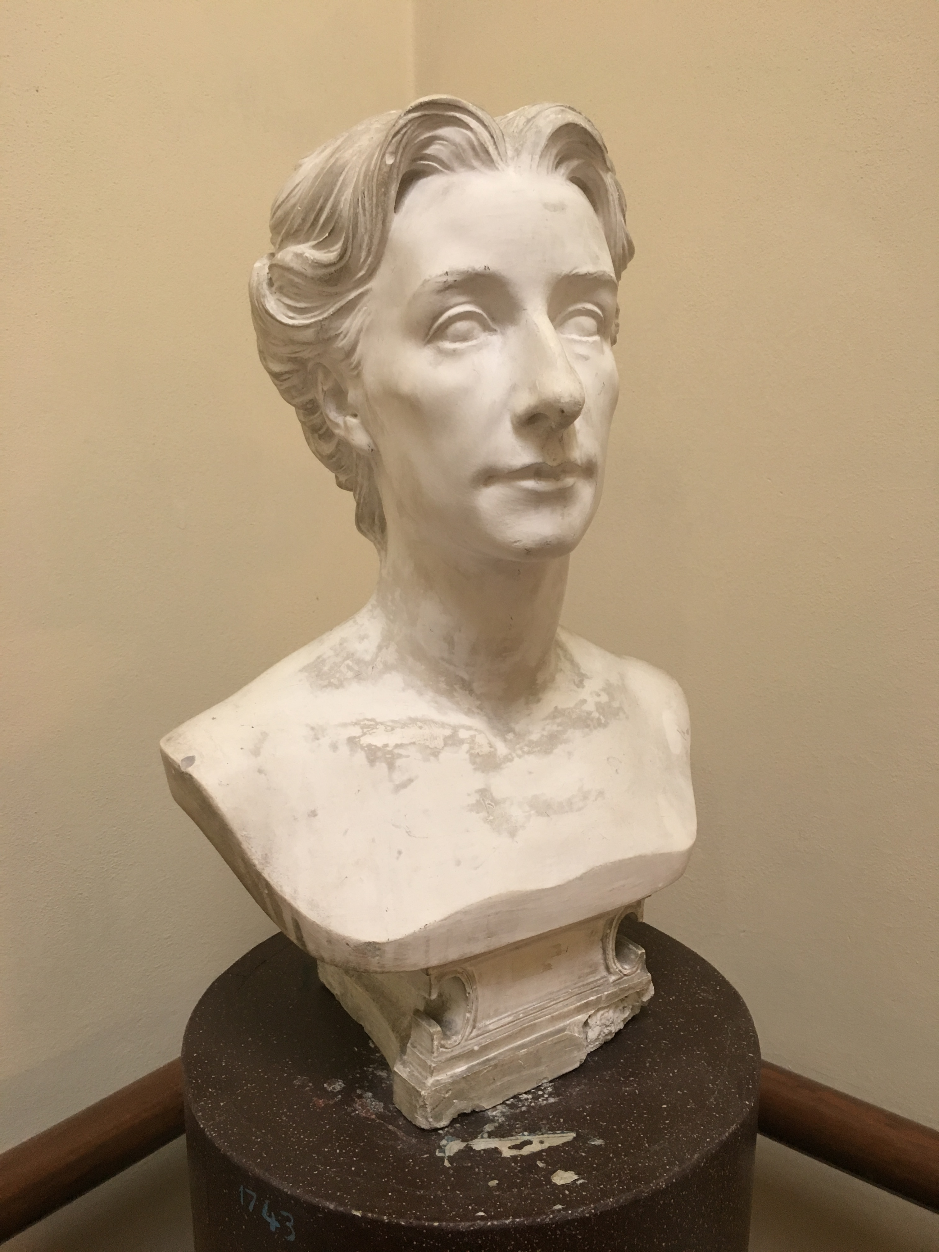 Il busto di Cosima Wagner scolpito da Gustav Kietz nel 1873. Conservatorio Cherubini di Firenze